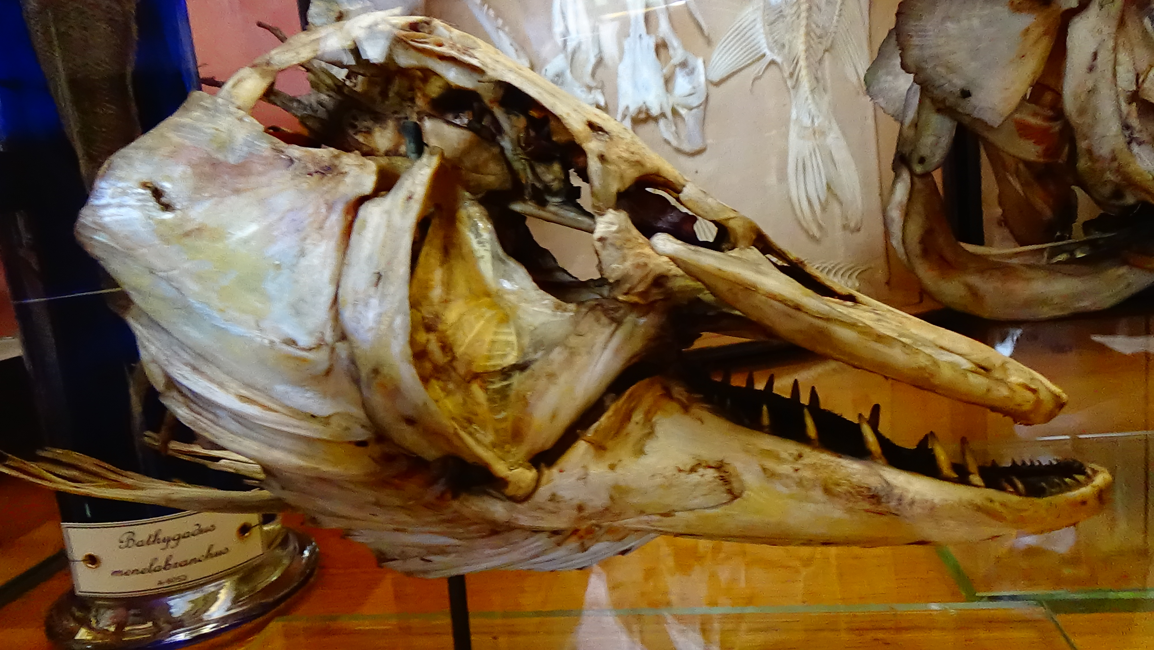 Esox Lucius - squelette mnhn Paris